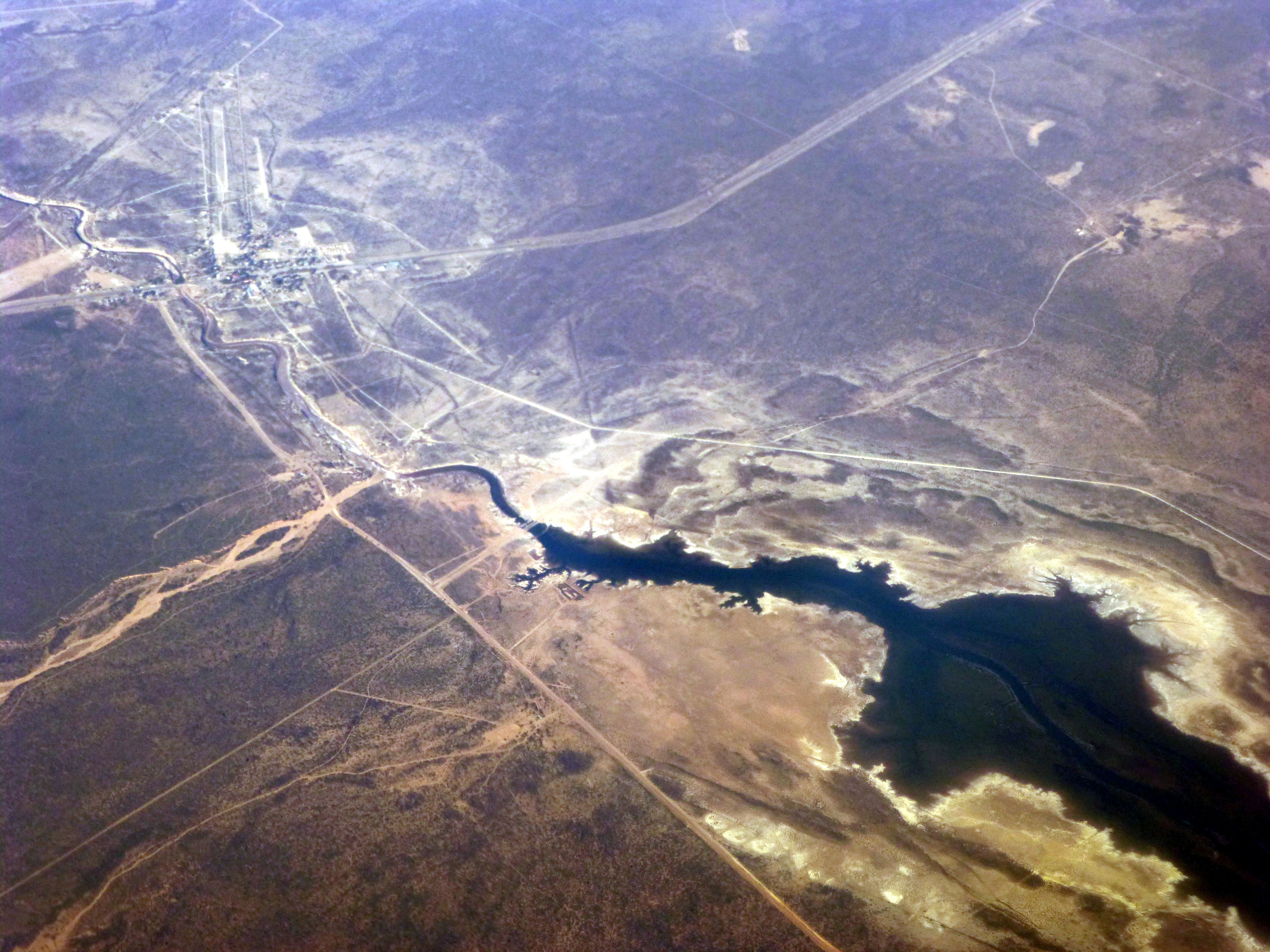 Río Desaguadero haciendo de frontera entre las provincias de Mendoza y San Luis. Tomada desde un avión.